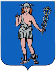 herb Podwoloczysk